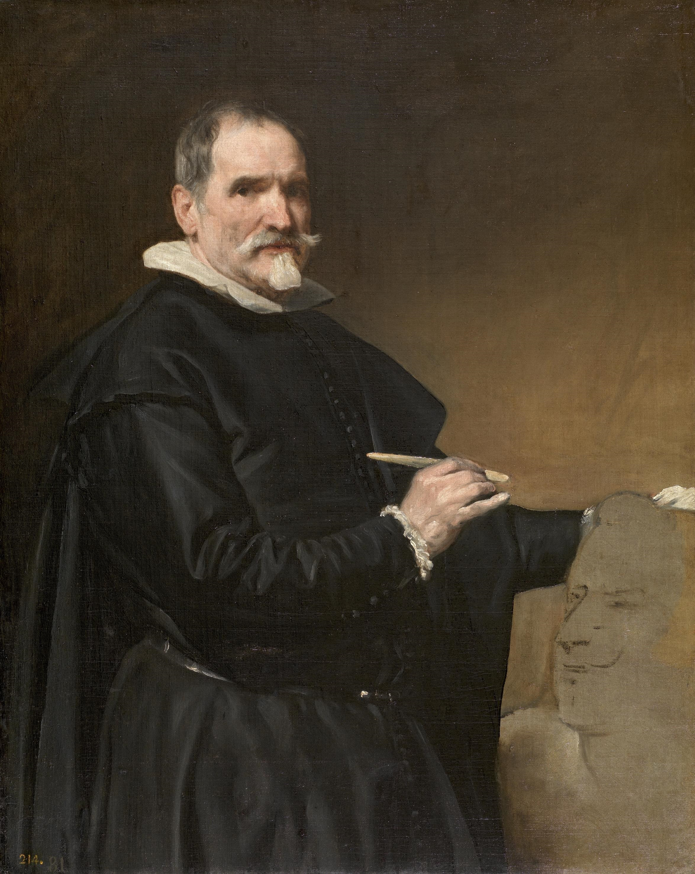 Retrato del insigne escultor español Juan Martínez Montañés (1568-1649).